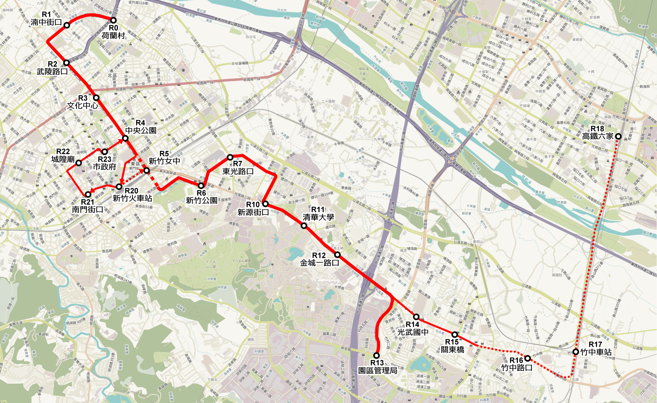 2001年新竹市輕軌運輸系統規劃紅線路線圖